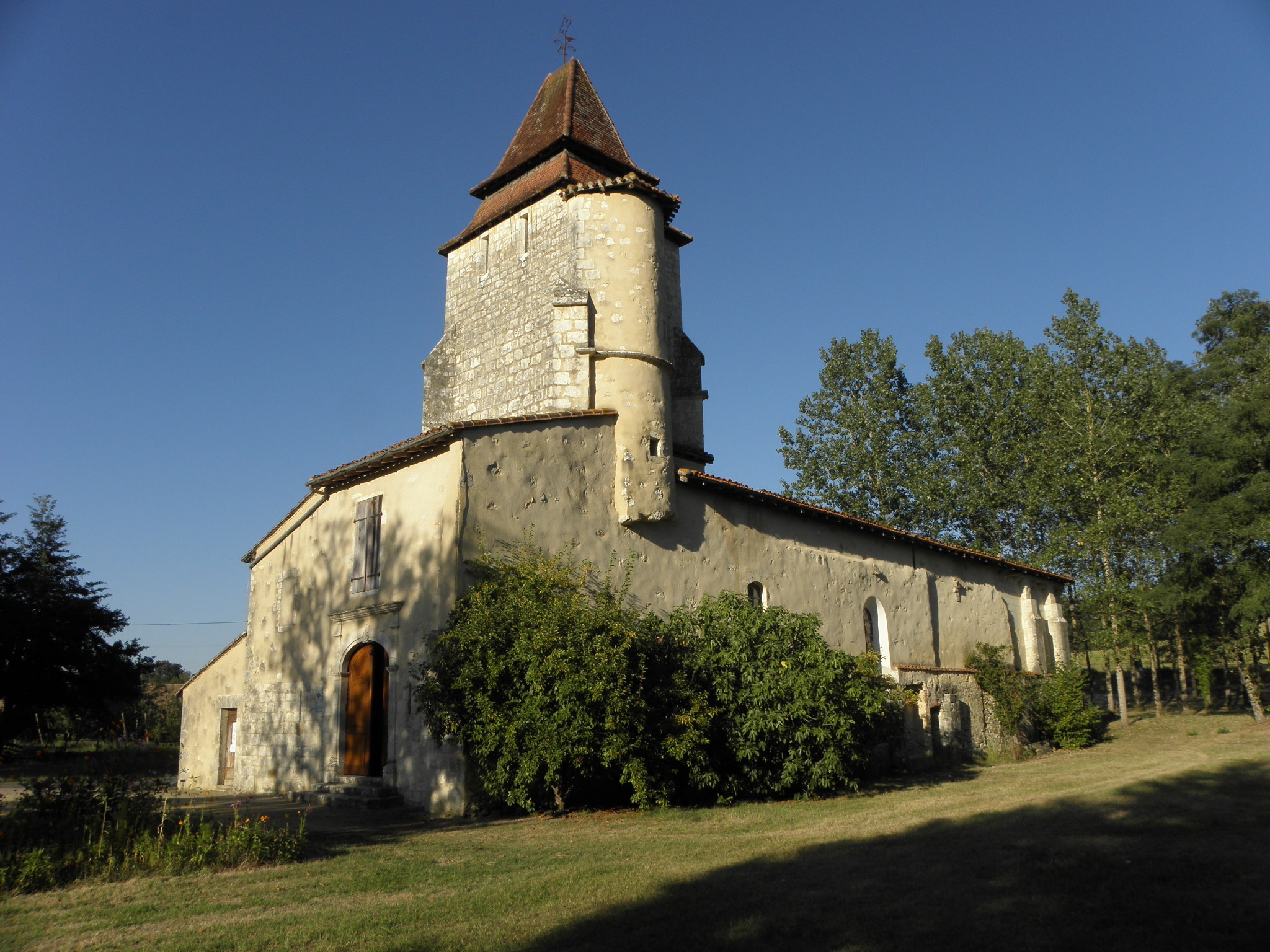 Eglise Saint Pierre de Lagrange